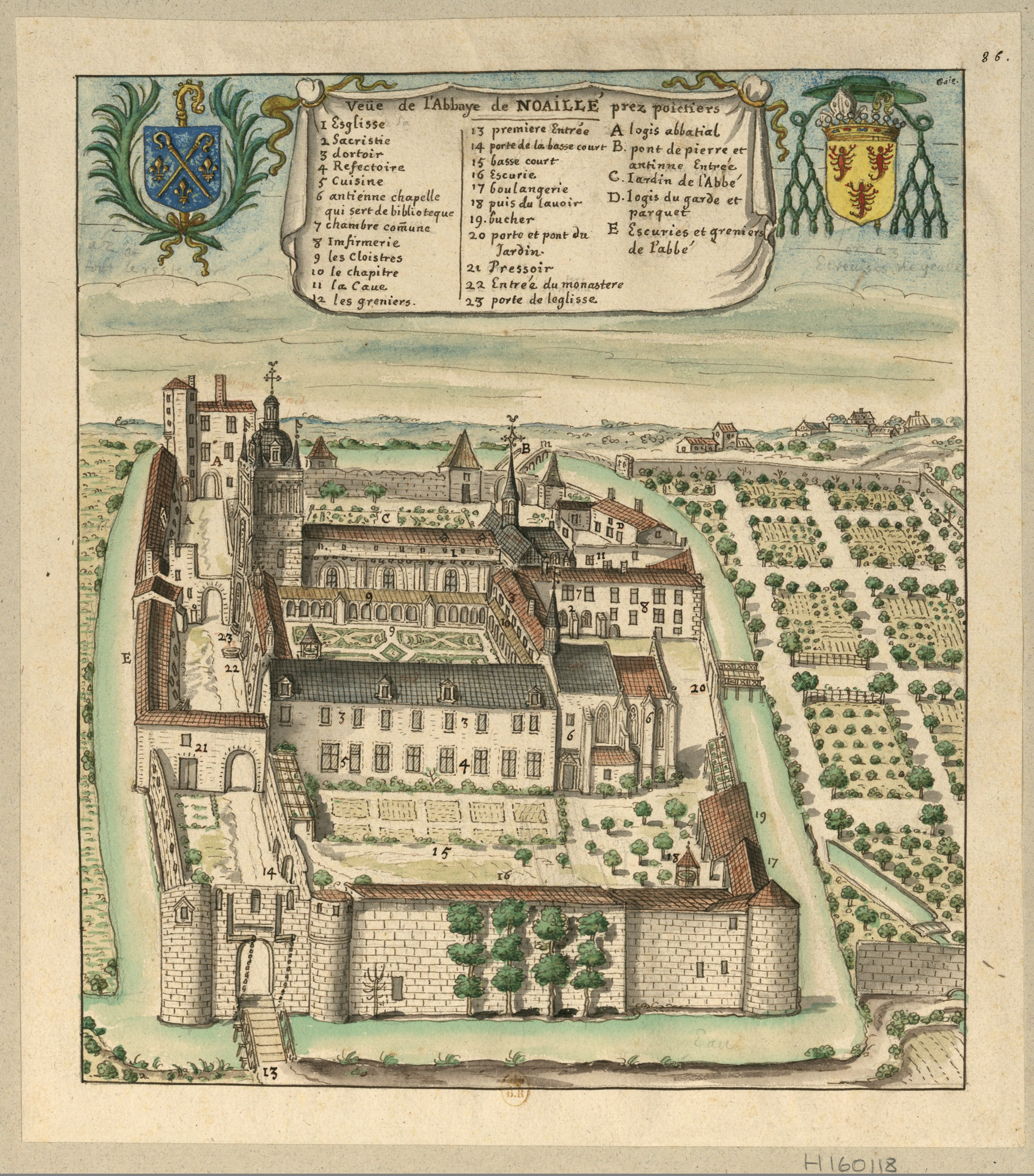 « Veüe de l'Abbaye de Noaillé prez poictiers » (Vue de l'Abbaye de Noaillé près de Poitiers)